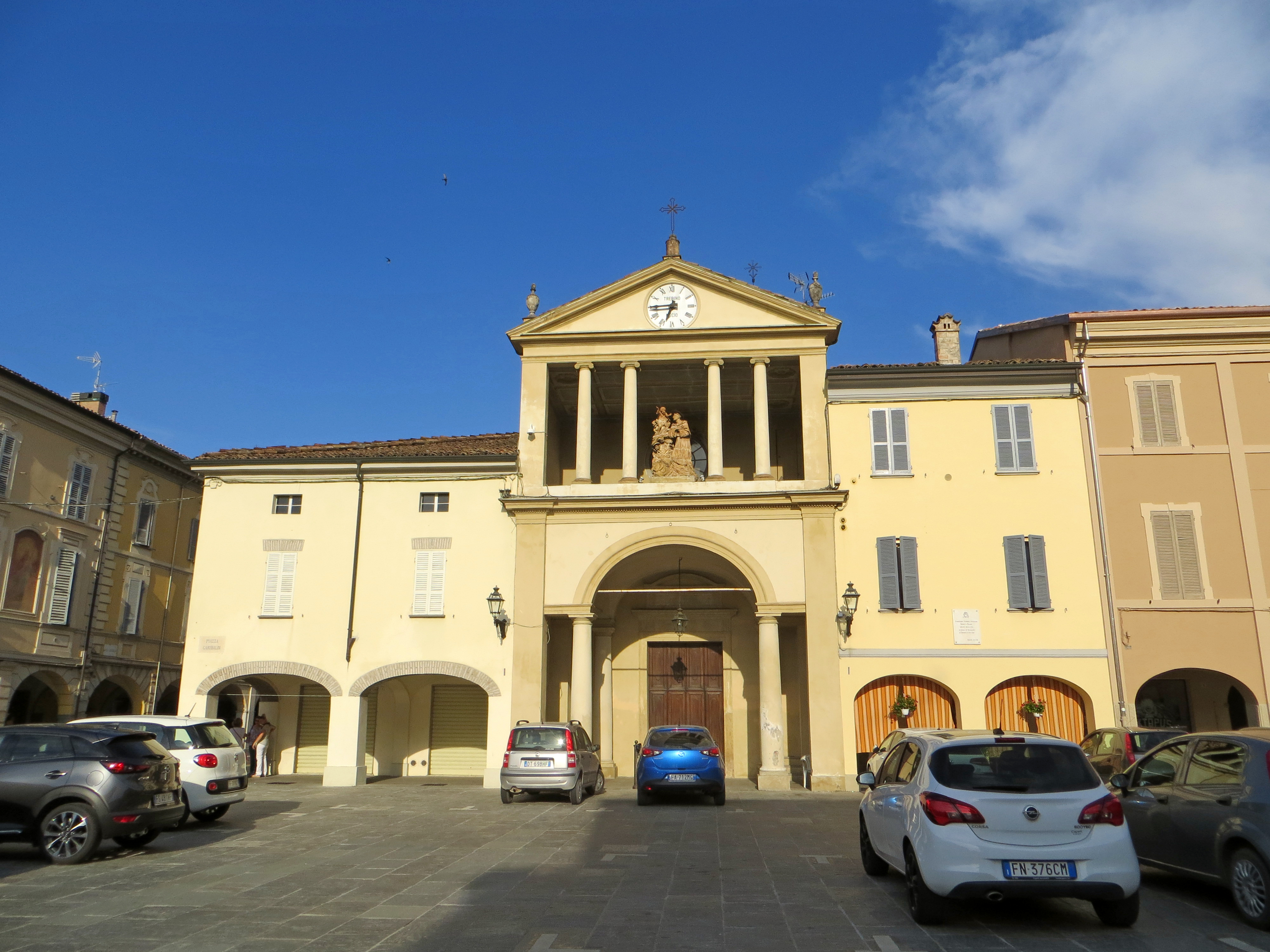 Oratorio di Sant'Antonio da Padova (Soragna) - facciata